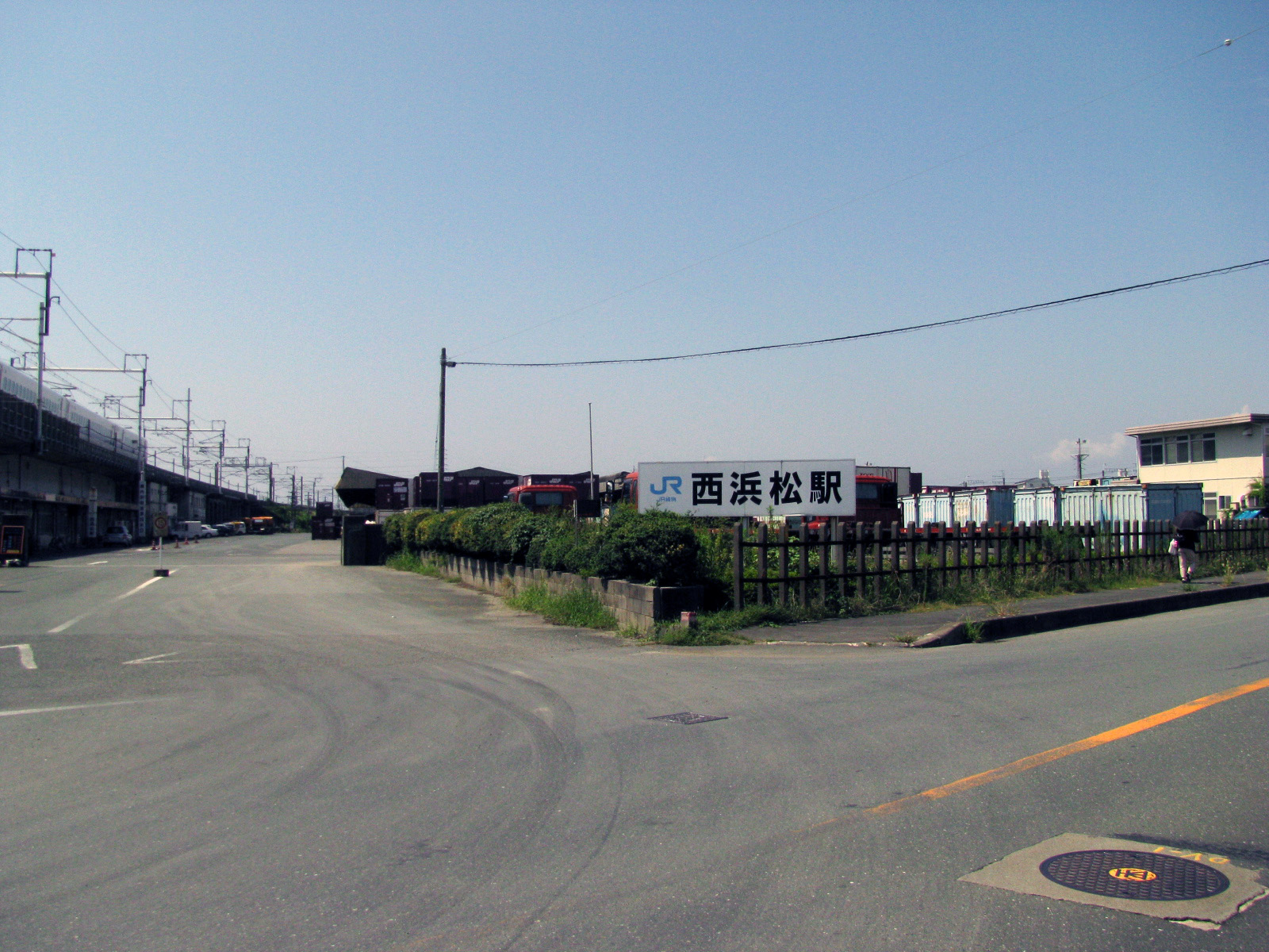 日本貨物鉄道西浜松駅